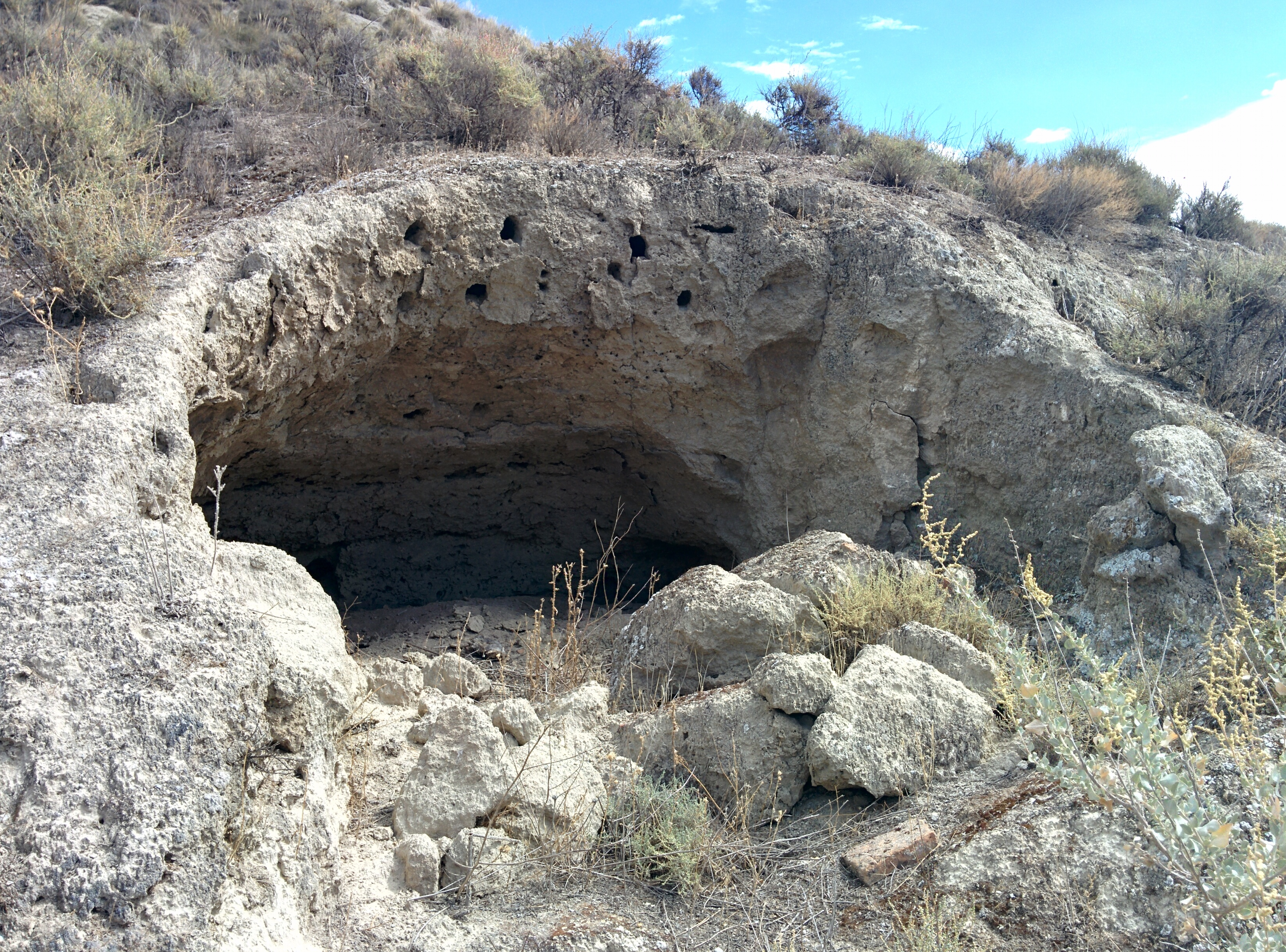 Salinas Espartinas, en Ciempozuelos (Madrid, España).